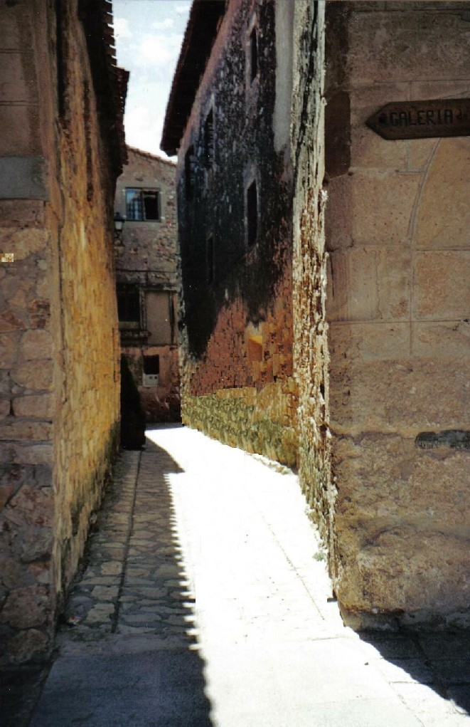 Callejón de la villa medieval de Medinaceli (Soria)